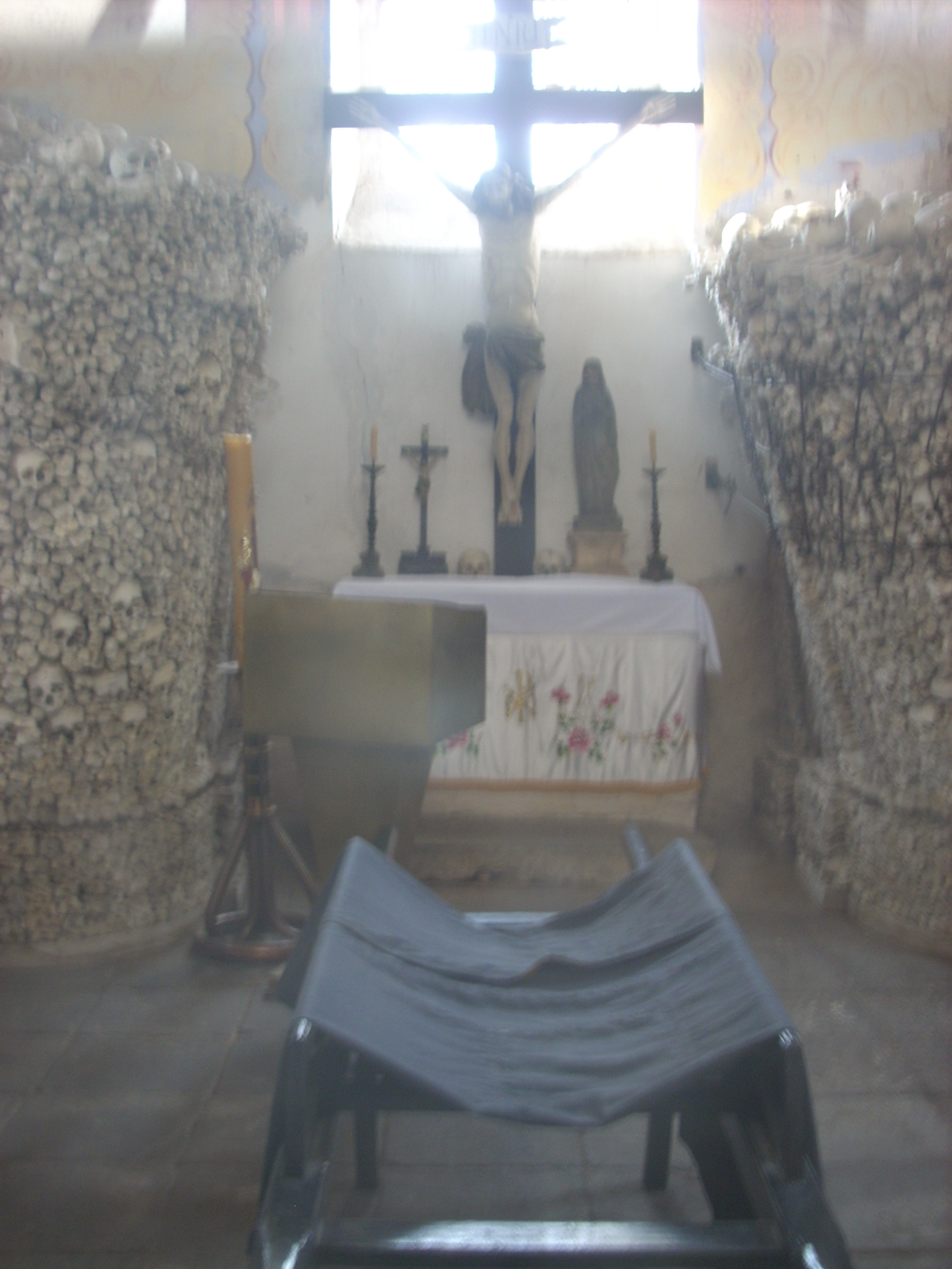 Nížkov, interiér kostnice